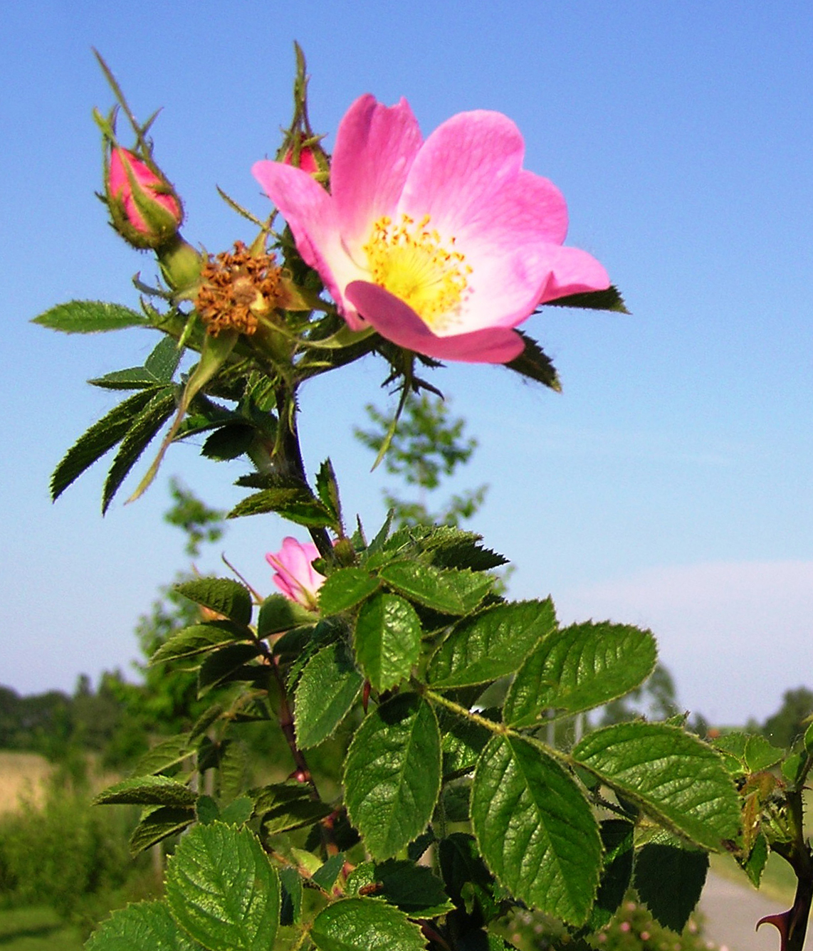 Rosa rubiginosa mit einigen Knospen, fotografiert in Barth